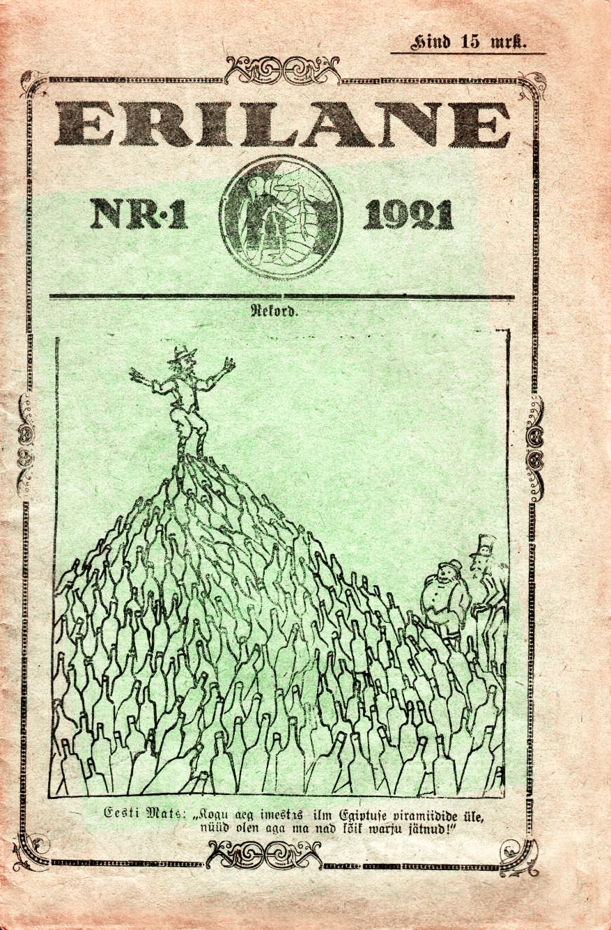 Erilane, nr 1, esikaas